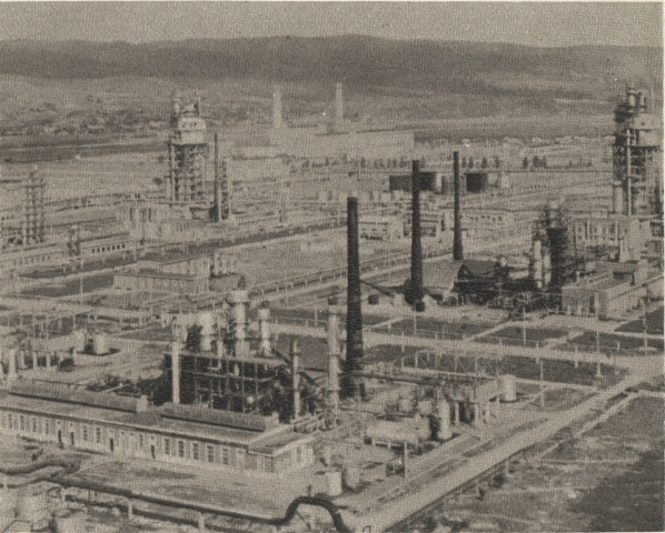 Rafinăria din orașul Gheorghe Gheorghiu-Dej (Onești) și Termocentrala Borzești la depărtare.